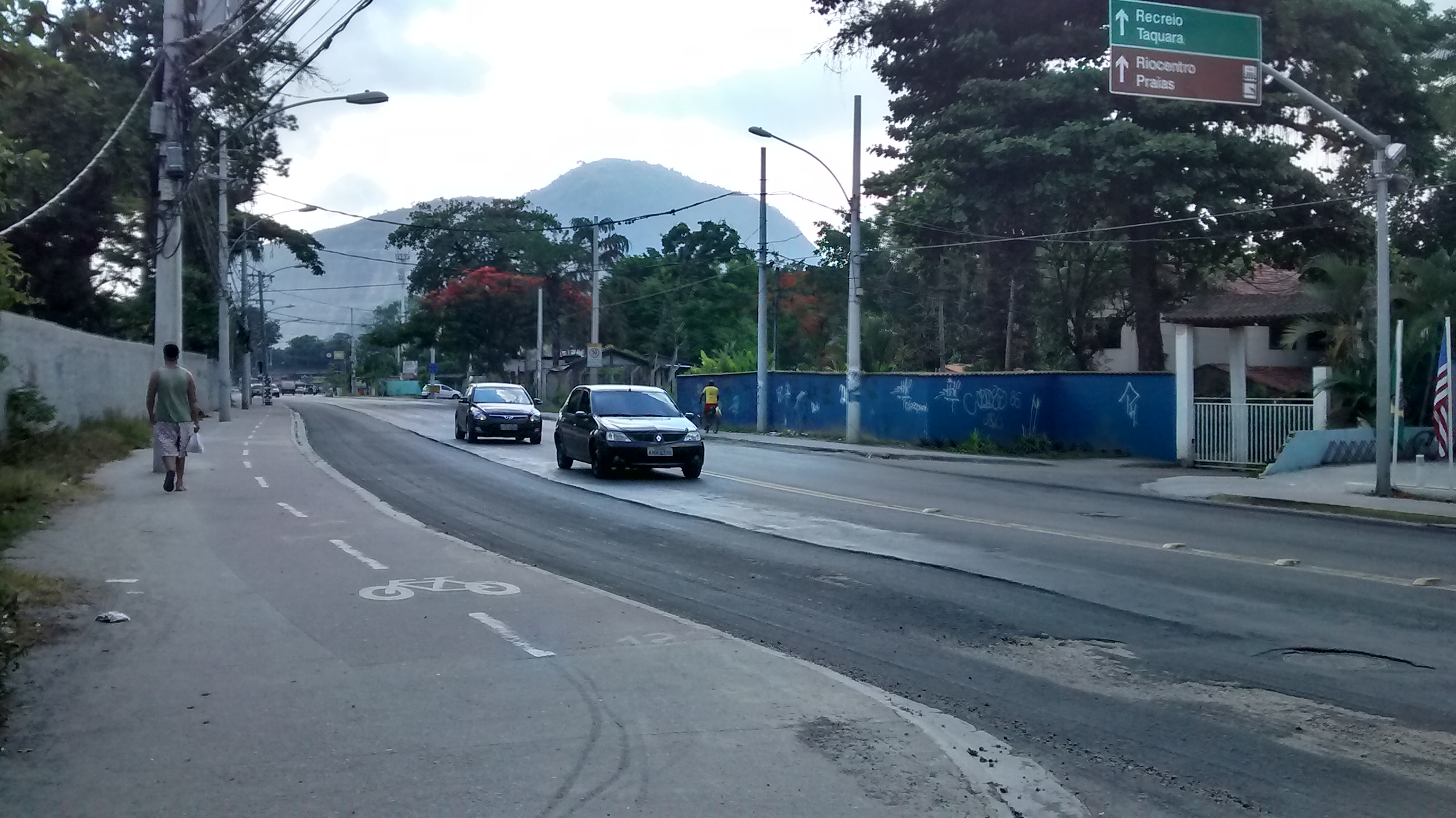 Vista do bairro de Vargem Grande, no Rio de Janeiro.